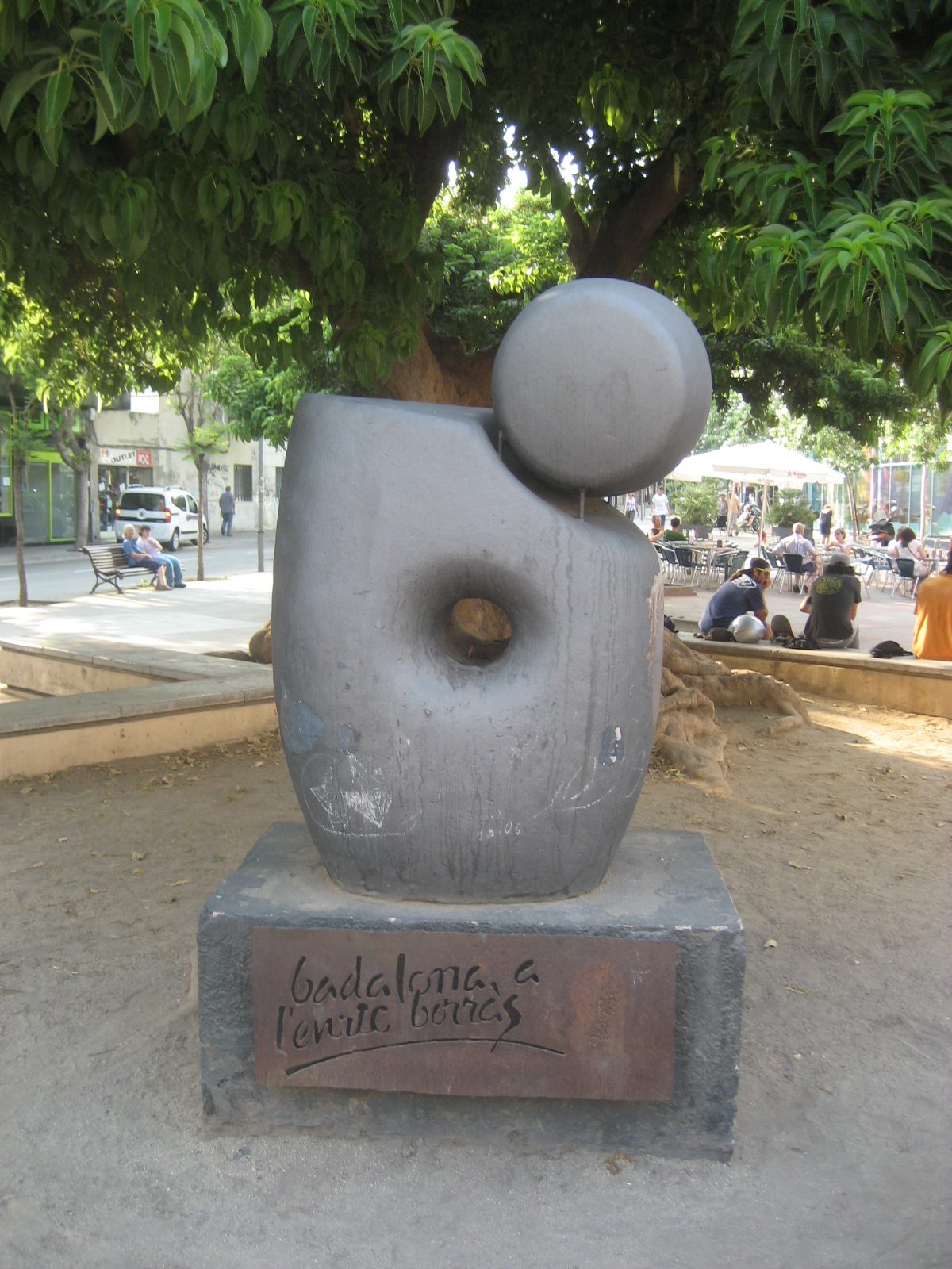 Situat a la plaça del Rector Rifé, davant de la parròquia de Sant Josep.